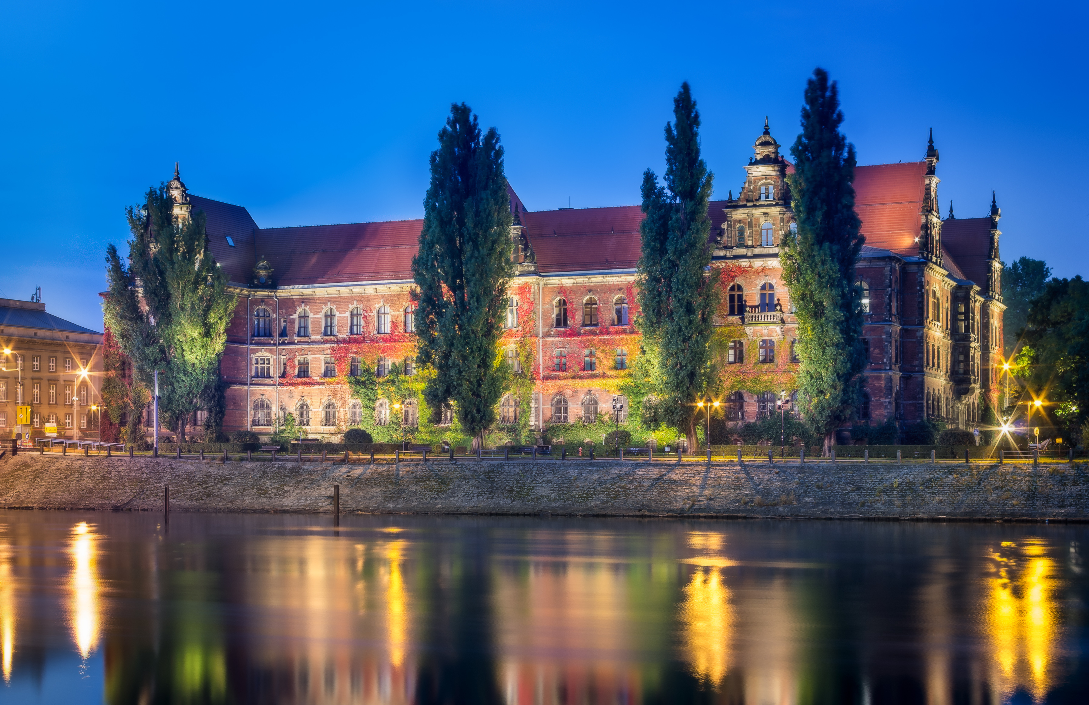 Wrocław, d. gmach Zarządu Prowincji, ob. Muzeum Narodowe, 1883-1886